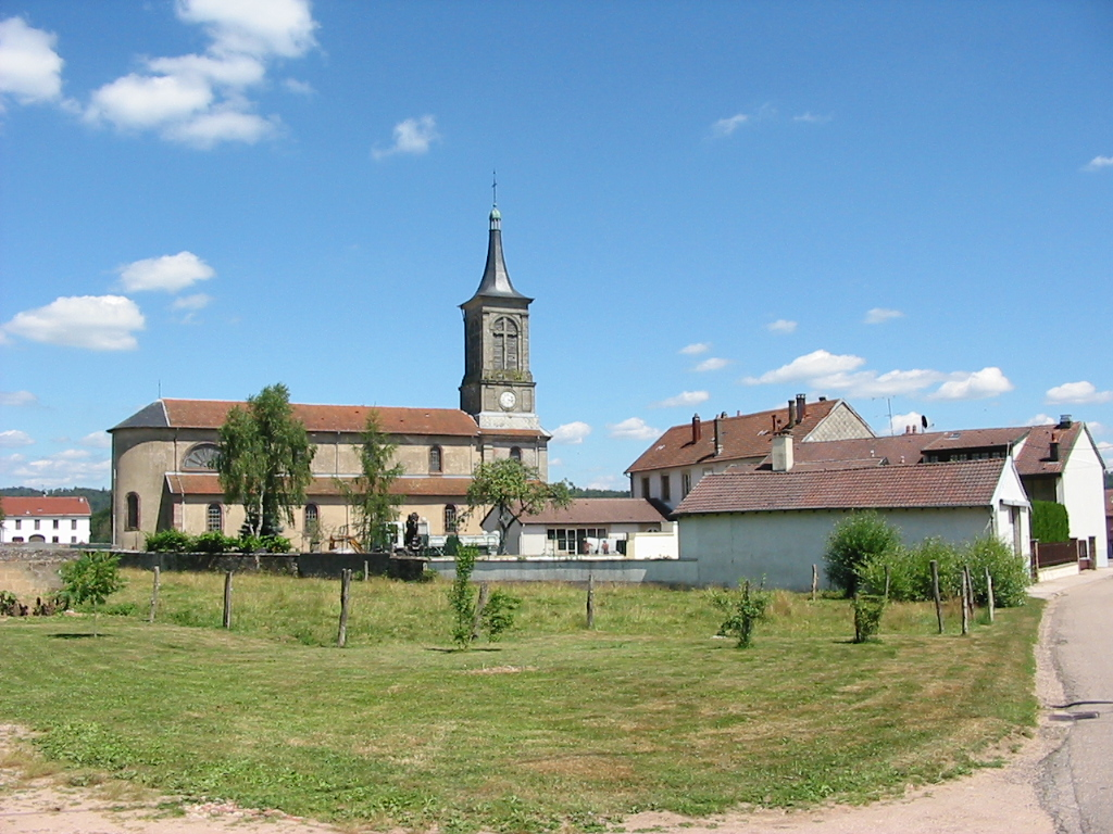 La Baffe Le hameau de La Baffe Commune du canton d'Épinal-Est (Vosges) Photo personnelle du 10 juillet 2006. Copyright © Christian Amet